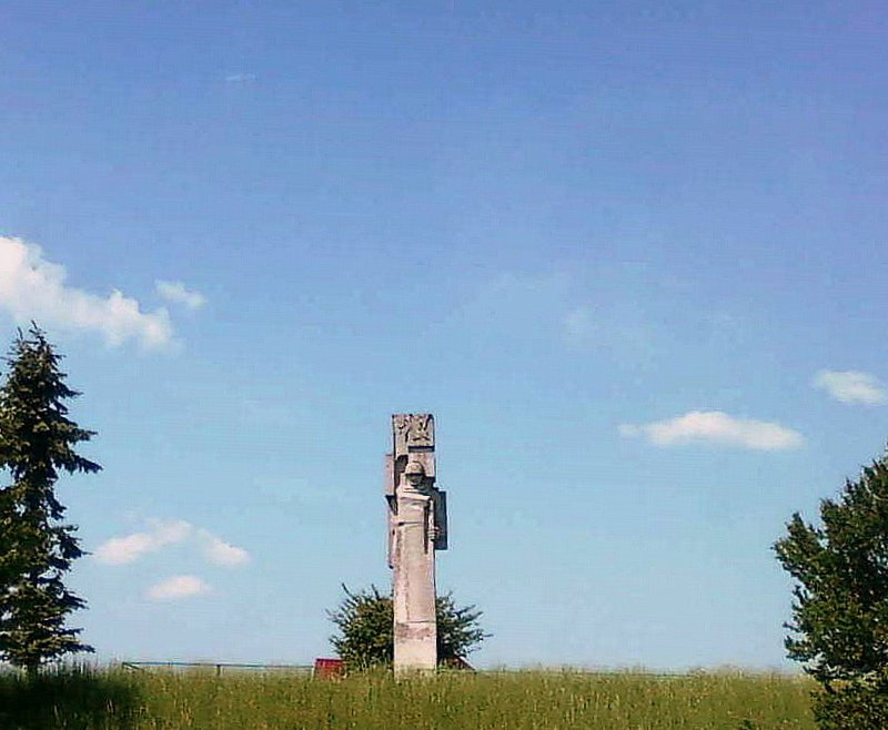 Памятник погибшим в годы Второй мировой войны в с. Зубра, Пустомытовского района Львовской области.